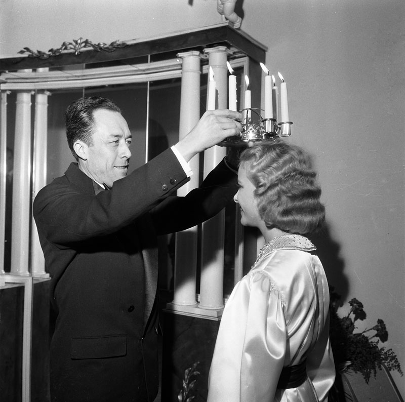 Hantverkargatan 1, Stadshuset. Nobelpristagaren Albert Camus kröner Stockholms lucia, Anita Björklund, på kröningsfest i Blå hallen